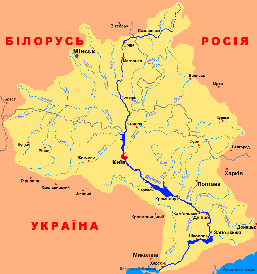 Схема басейну ріки Дніпро